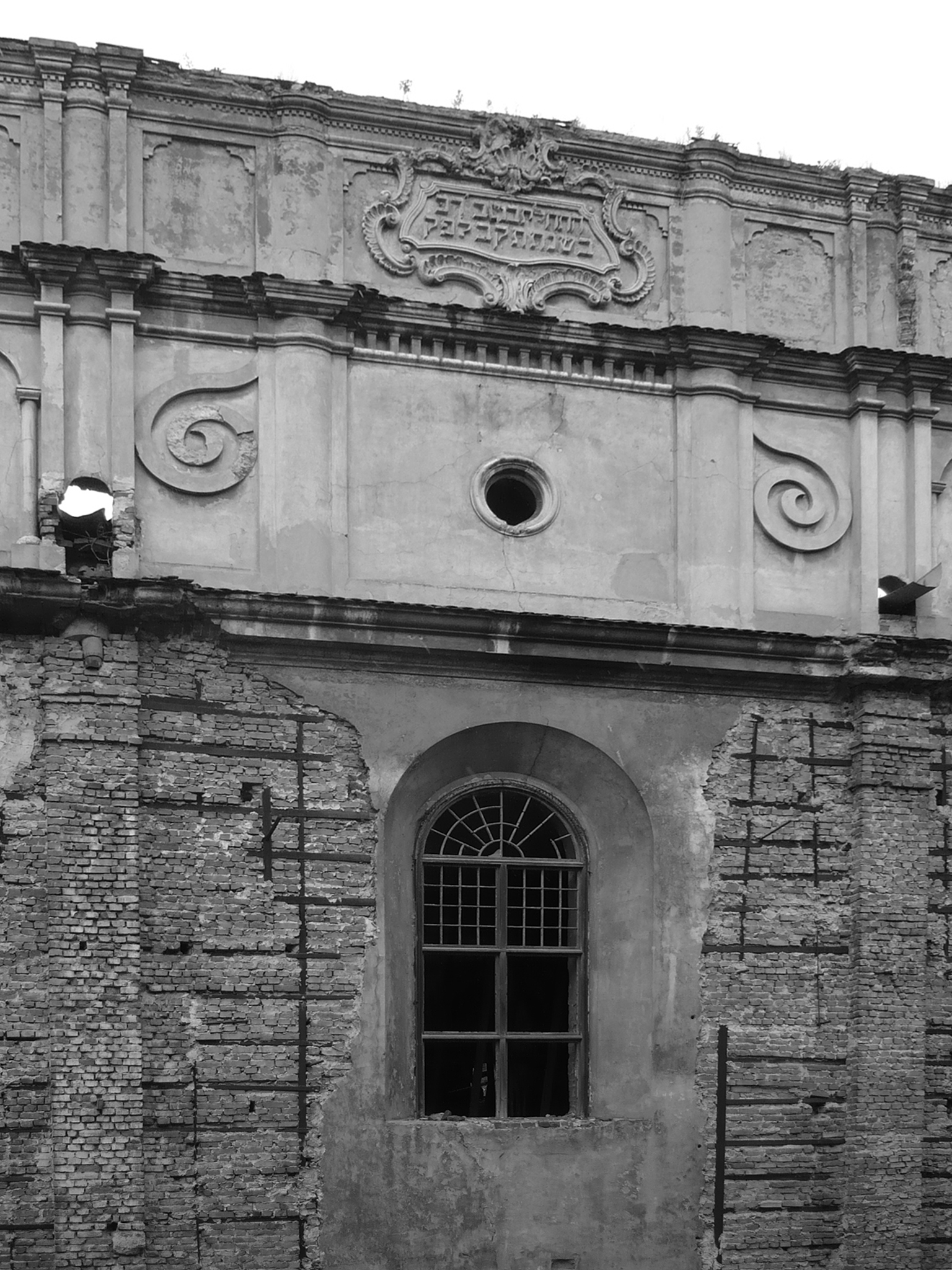 Synagoga w Brodach na Ukrainie